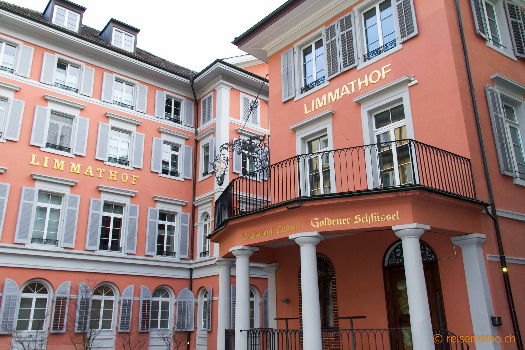 Restaurant Goldener Schlüssel des Hotels Limmathof Baden